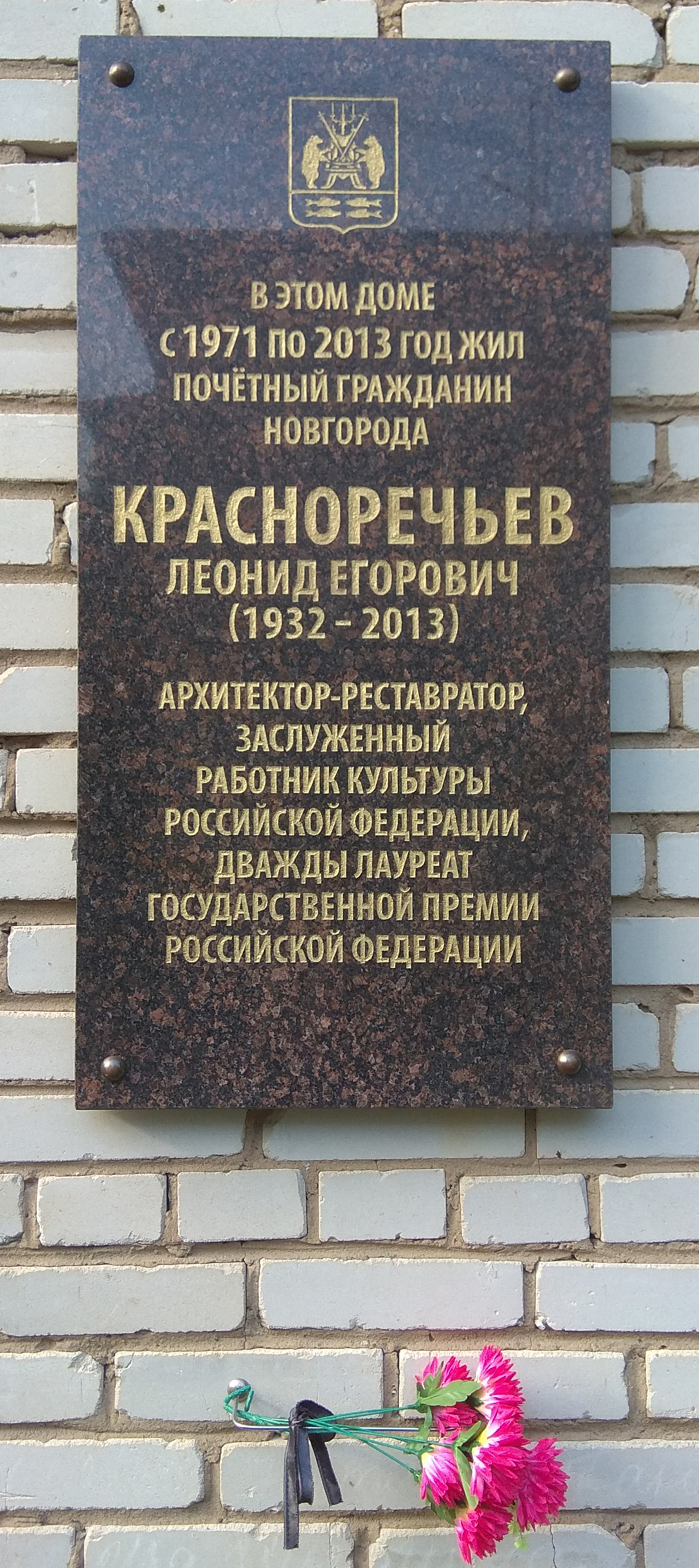 ку...